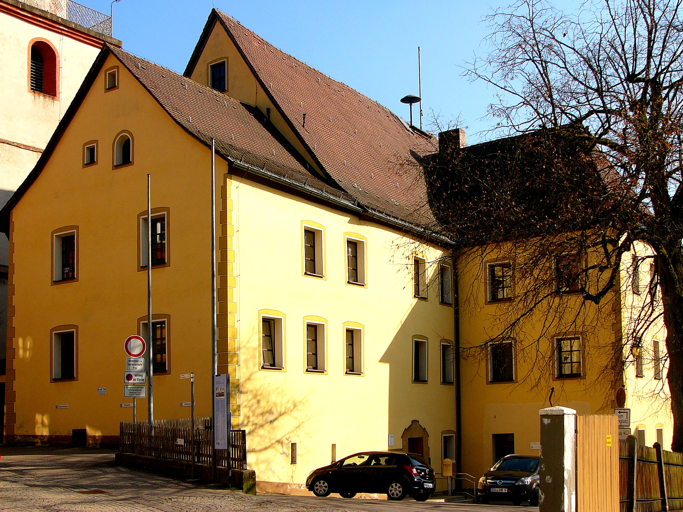 Ehemaliges Nürnbergisches Pflegeschloss; Kernbau dreigeschossiger massiver verputzter Satteldachbau, Anbau dreigeschossig mit Walmdach, im Kern 14. Jahrhundert, erneuert 1559 und 1586, 1812 mit Anbau von Conrad Kramer versehen und zum Amtsgericht umgebaut; Reste der Schlossgarten-Stützmauern, zweite Hälfte 16./17. Jahrhundert.This is a photograph of an architectural monument.